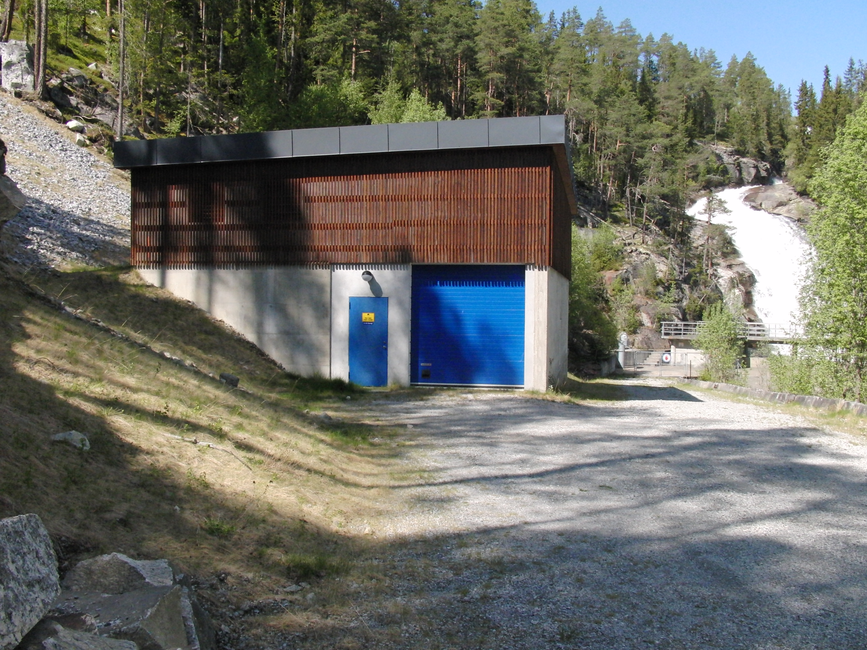 Lya kraftverk